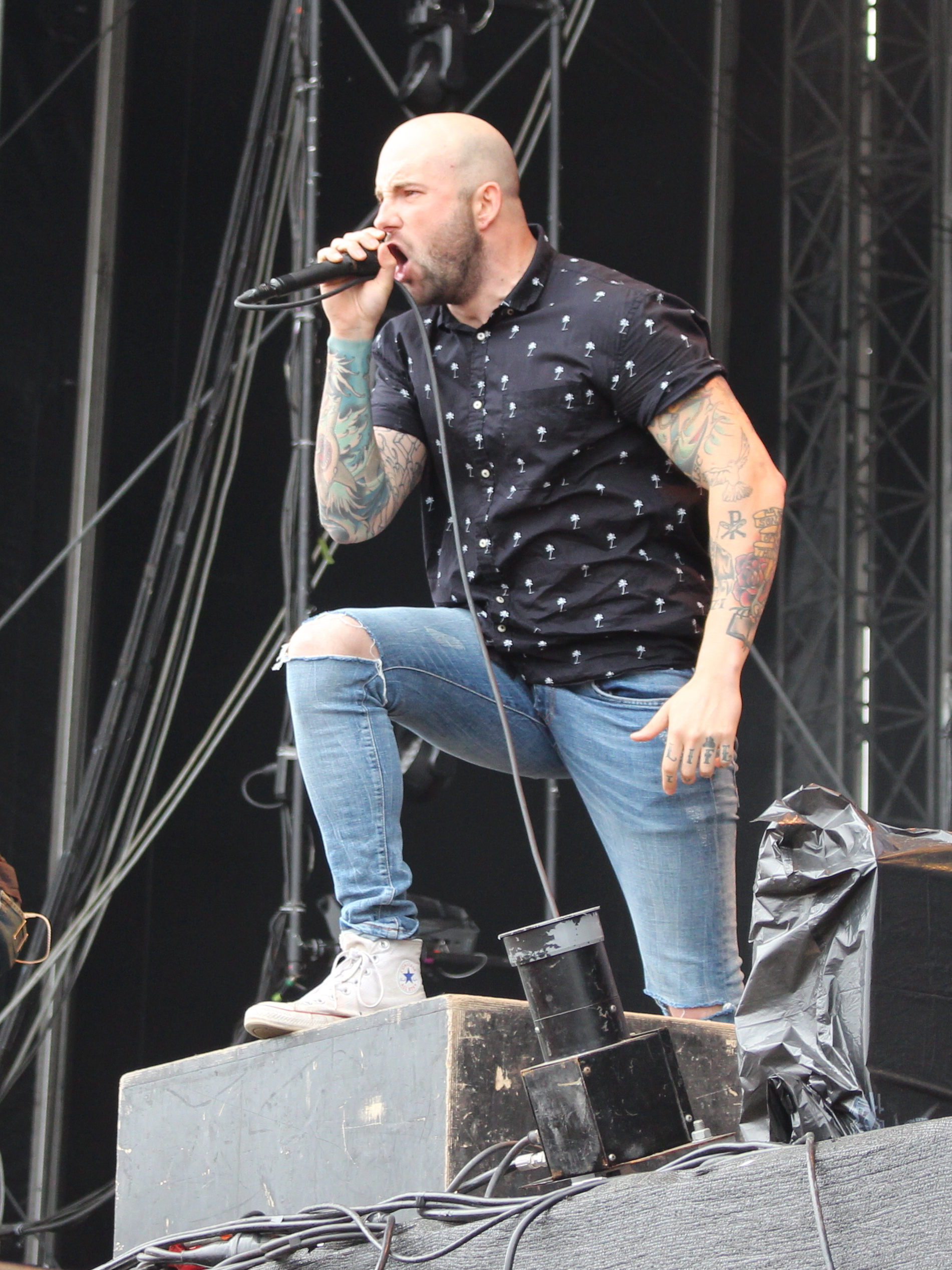 Festivalsommer This photo was created with the support of donations to Wikimedia Deutschland in the context of the CPB project "Festival Summer".